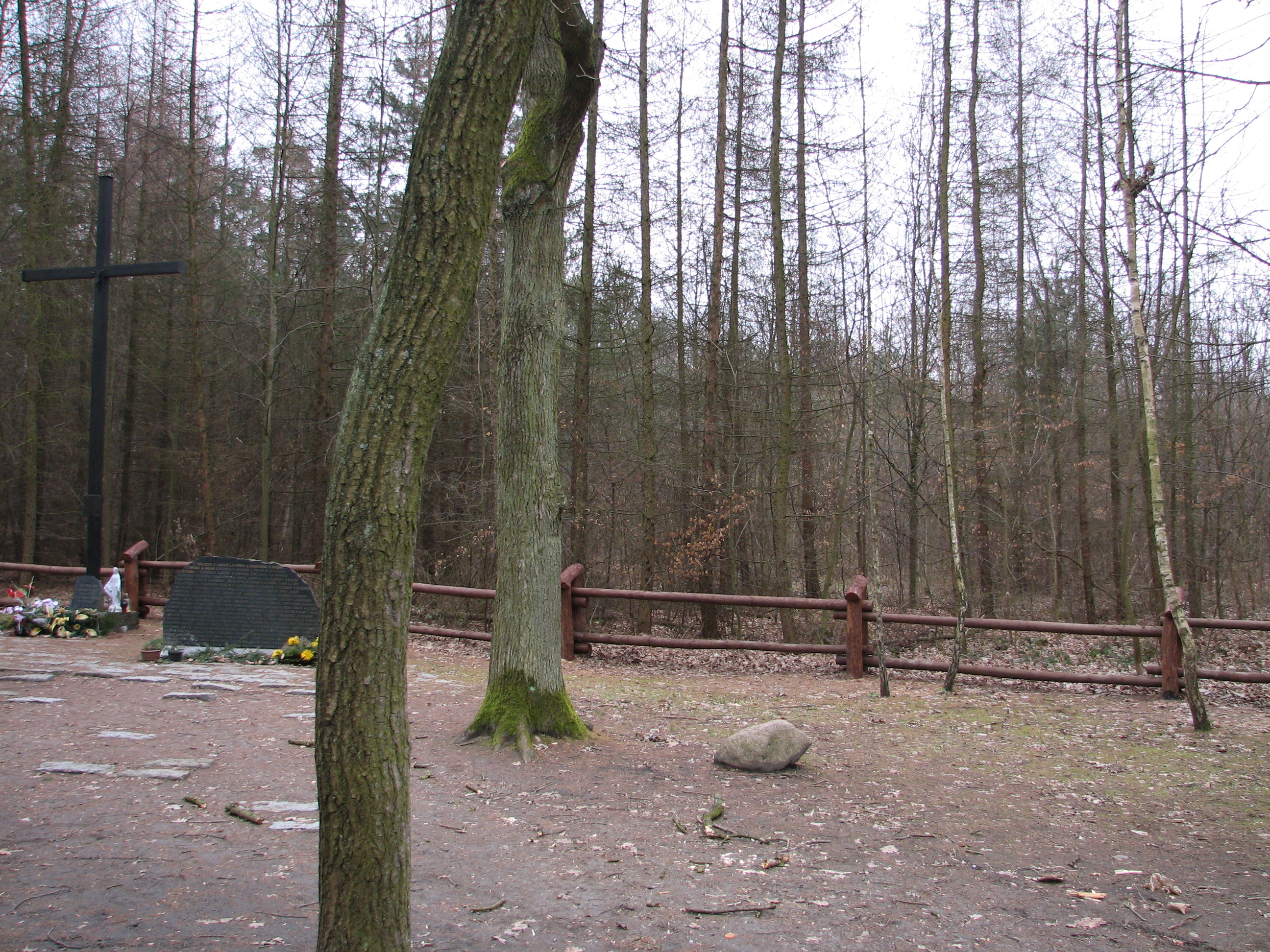 Miejsce katastrofy samolotu Ił-62M SP-LBG "Tadeusz Kościuszko" zaistniałej 9 maja 1987 roku. Warszawa, Las Kabacki al. Załogi Samolotu Kościuszko